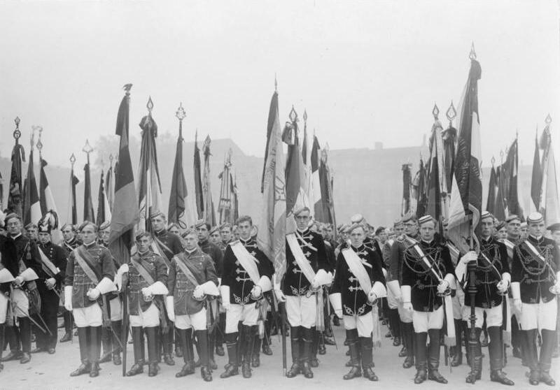 Eine machtvolle Kundgebung der ehemaligen Flandernkämpfer zum 20. Jahrestage der Schlacht bei Langemark im Lustgarten in Berlin! Studentenabordnungen in Wichs bei der Ehrung für die gefallenen Kameraden von Langemark im Lustgarten in Berlin.